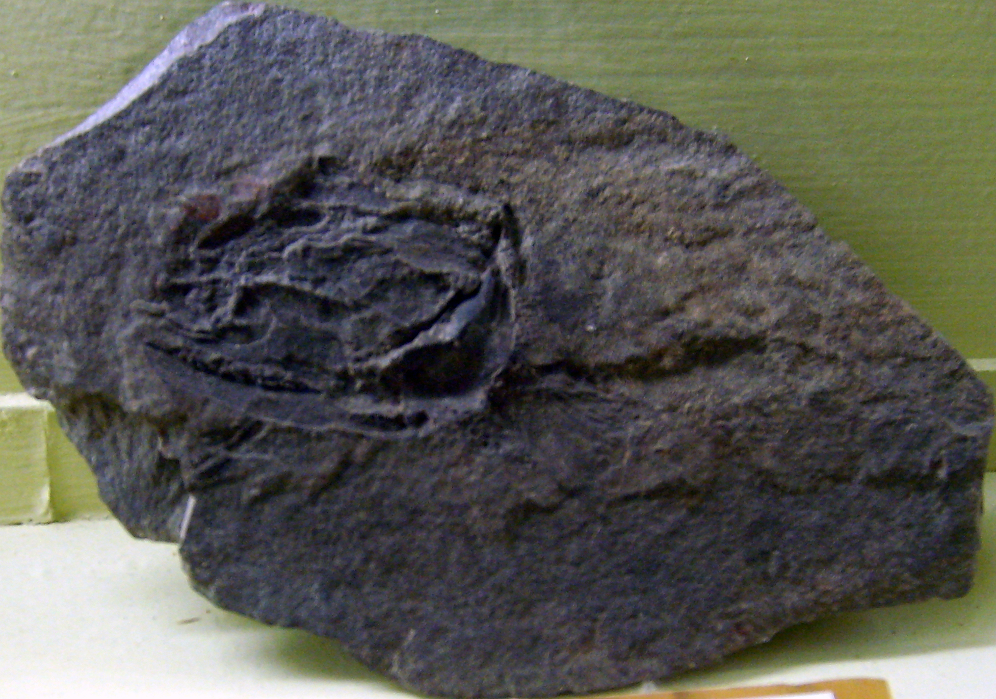 Cheirolepis trailli fossil at the Museum für Naturkunde, Berlin.